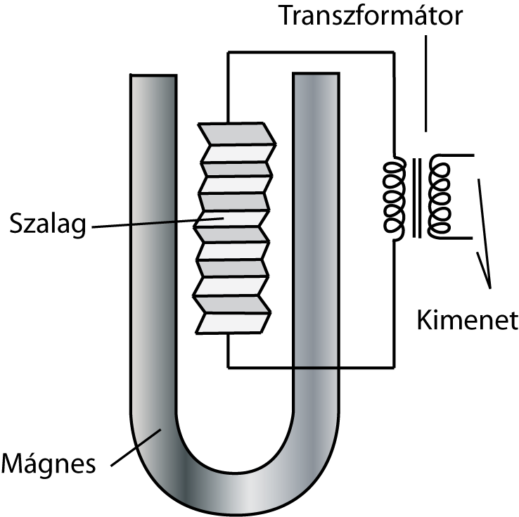 Szalag mikrofon